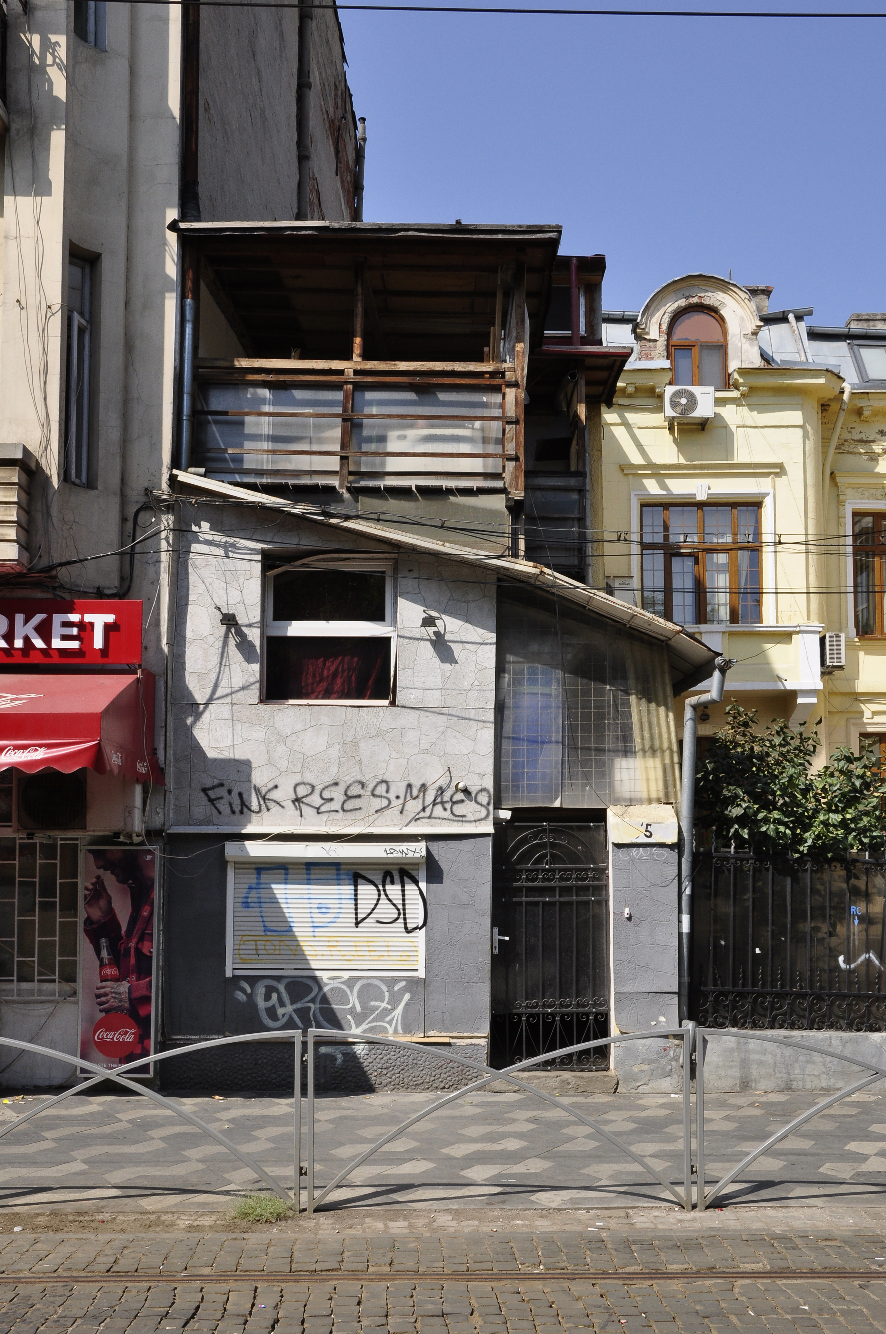 Casă - Str. Băniei 15